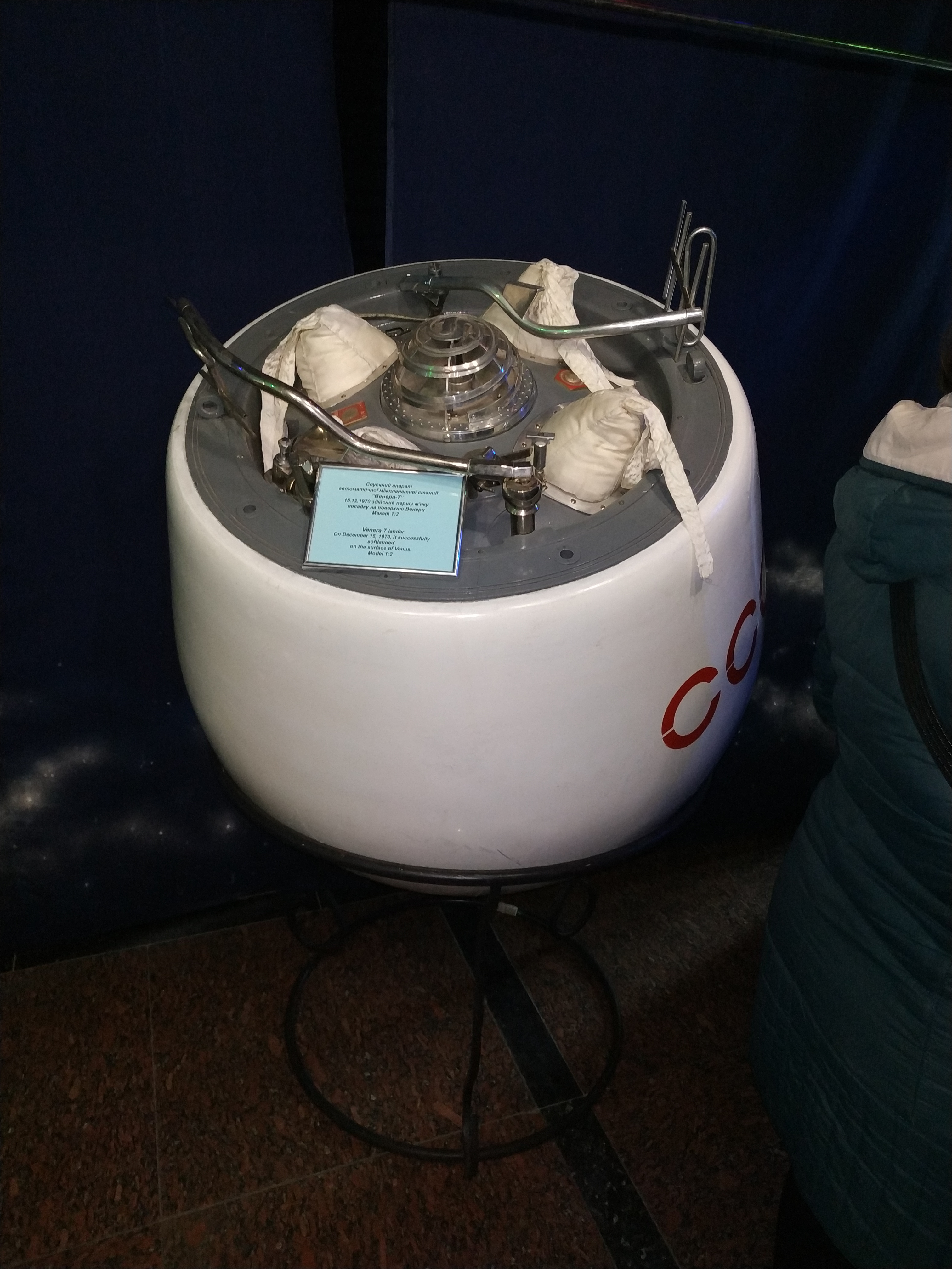 15.12.1970 перша м'яка посадка на поверхню Венери